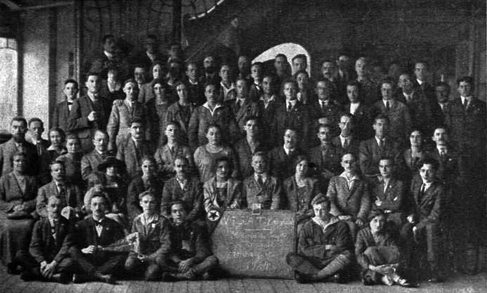 SAT-kongreso en 1924 en Bruselo. Komuna foto de la partoprenantoj.